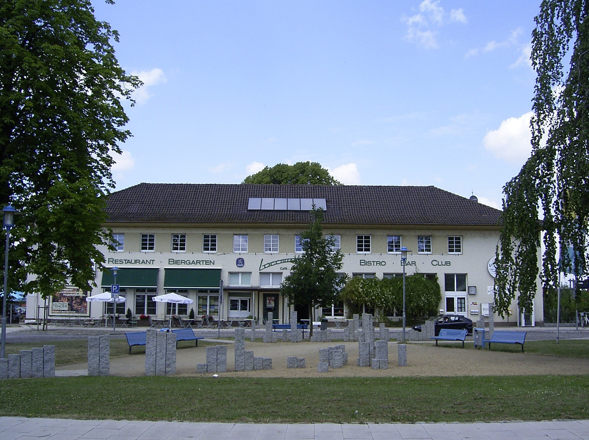 Gaststätte "Locomotive" im Bahnhofsgebäude von Bad Nenndorf